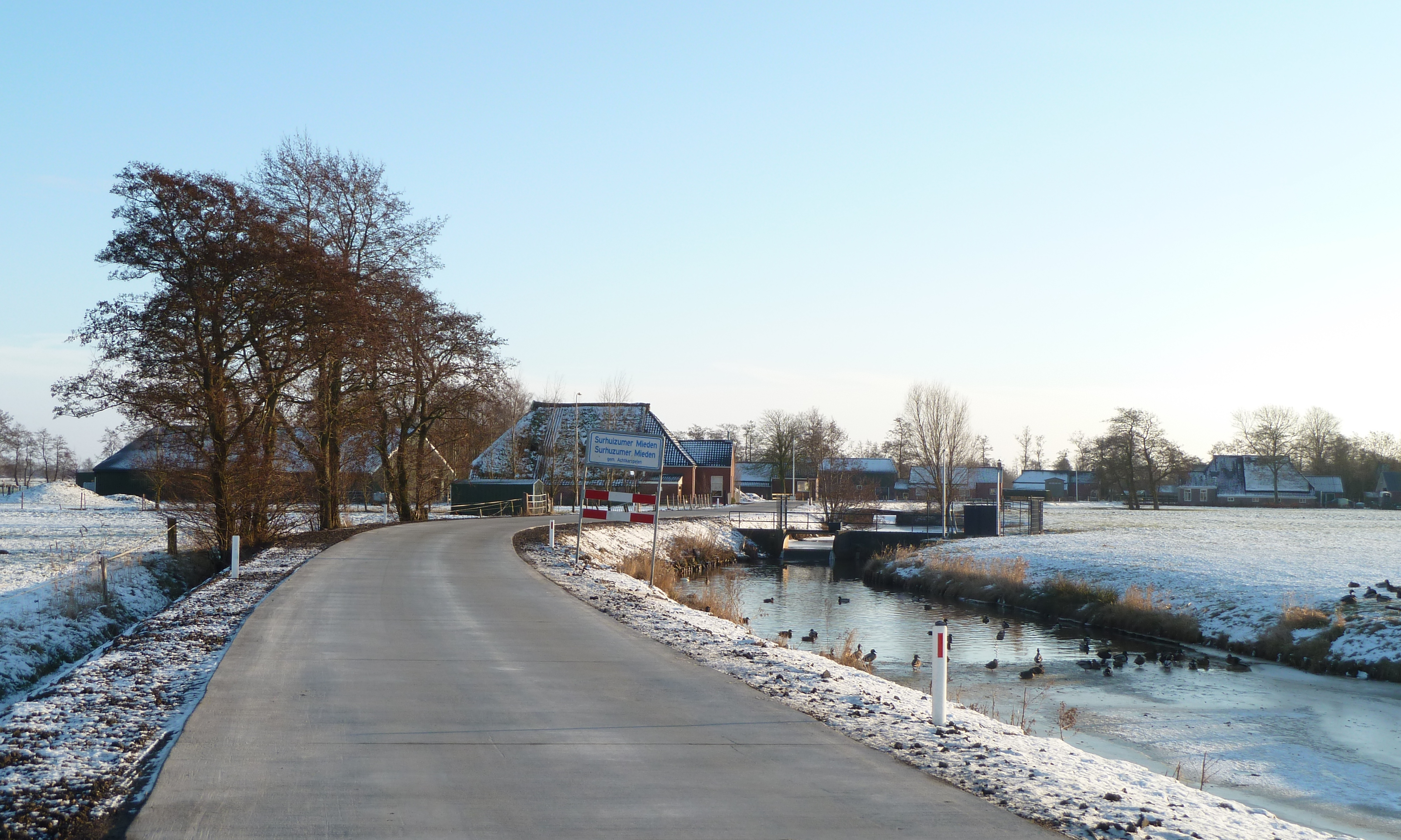 Plaatsnaambordje Surhuizumer Mieden (Achtkarspelen, Friesland, Nederland).